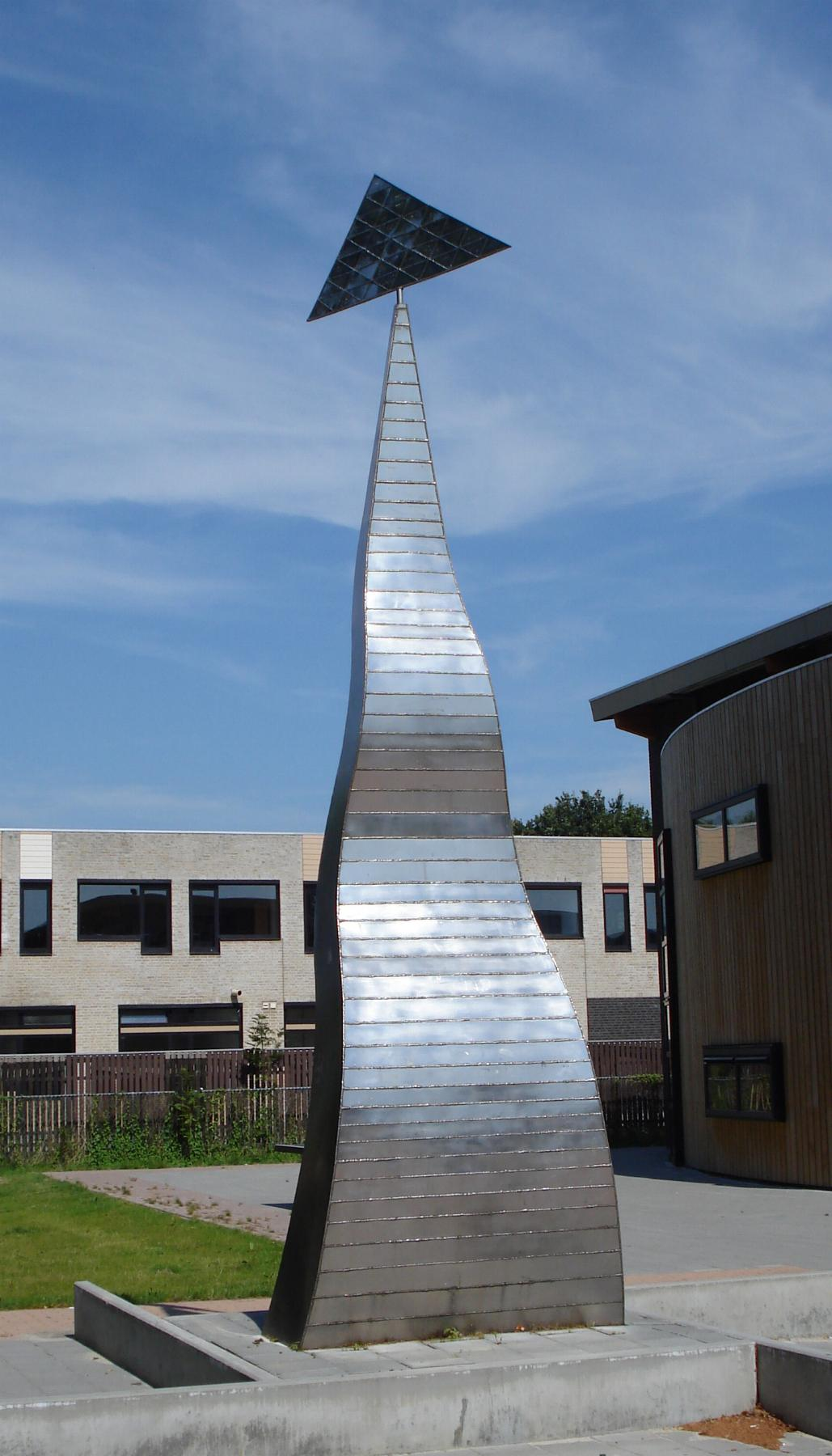 Hoogeveen, De Wielewaal. Kinetisch object zonder titel (1992) van Ko Vester. Hoogeveen/The Netherlands.